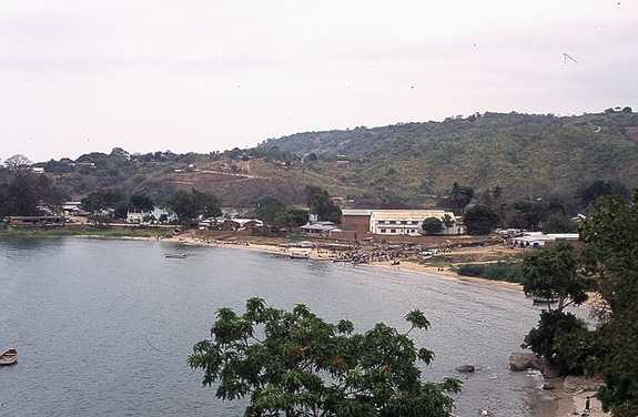 Nkatha Bay am Malawisee, aufgenommen mit einer Nikon F601